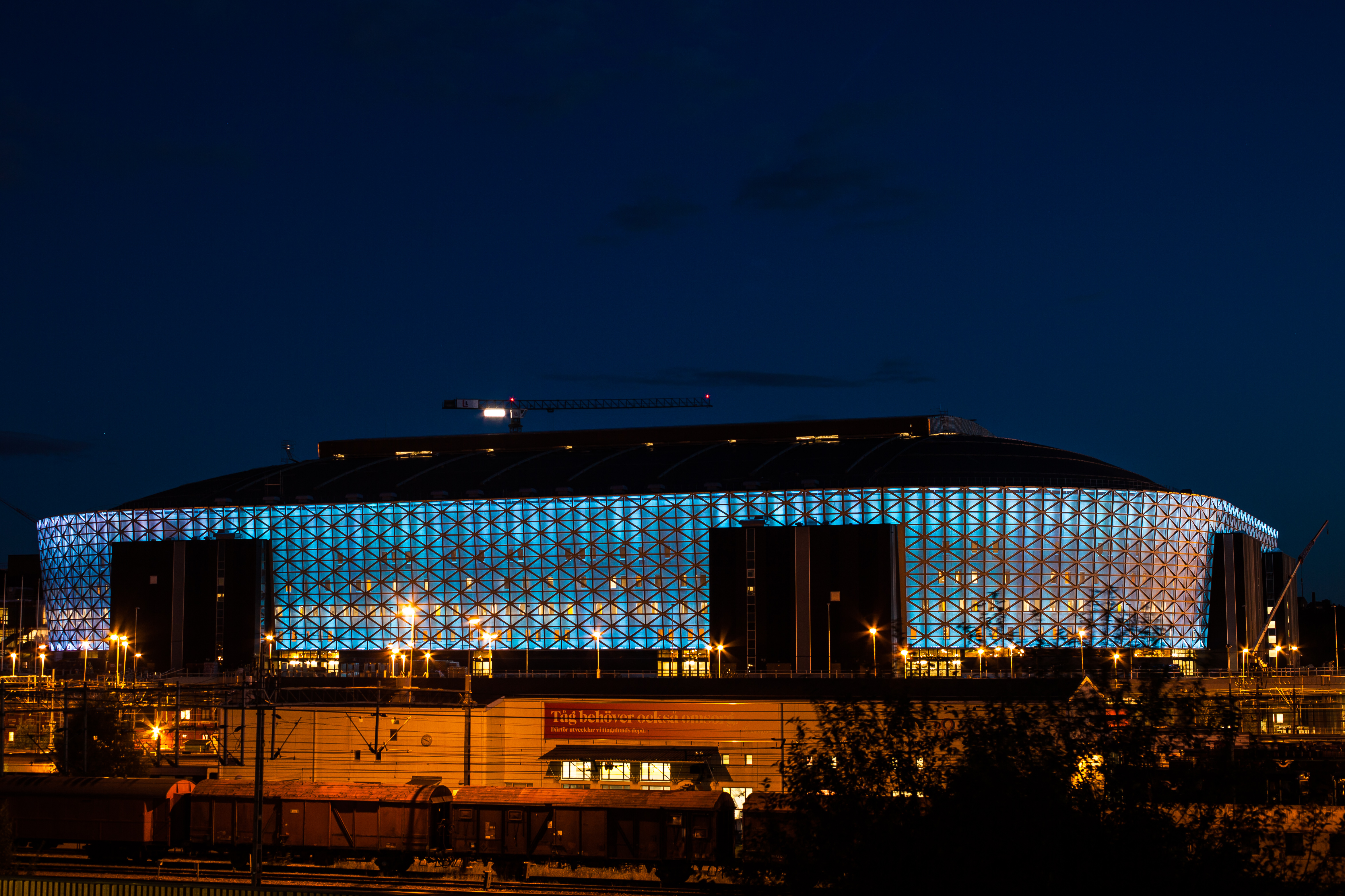 Håkan Dahlström Photography